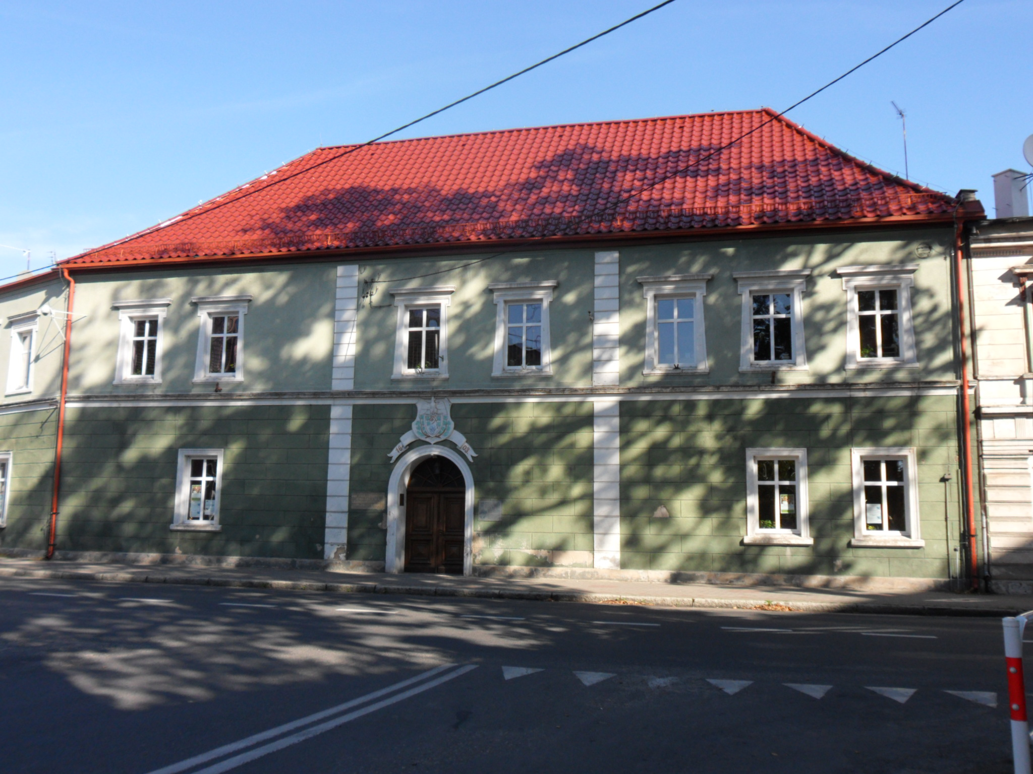 Jastrowie, ratusz, ob. dom mieszkalny, XVI, 1608, 1933